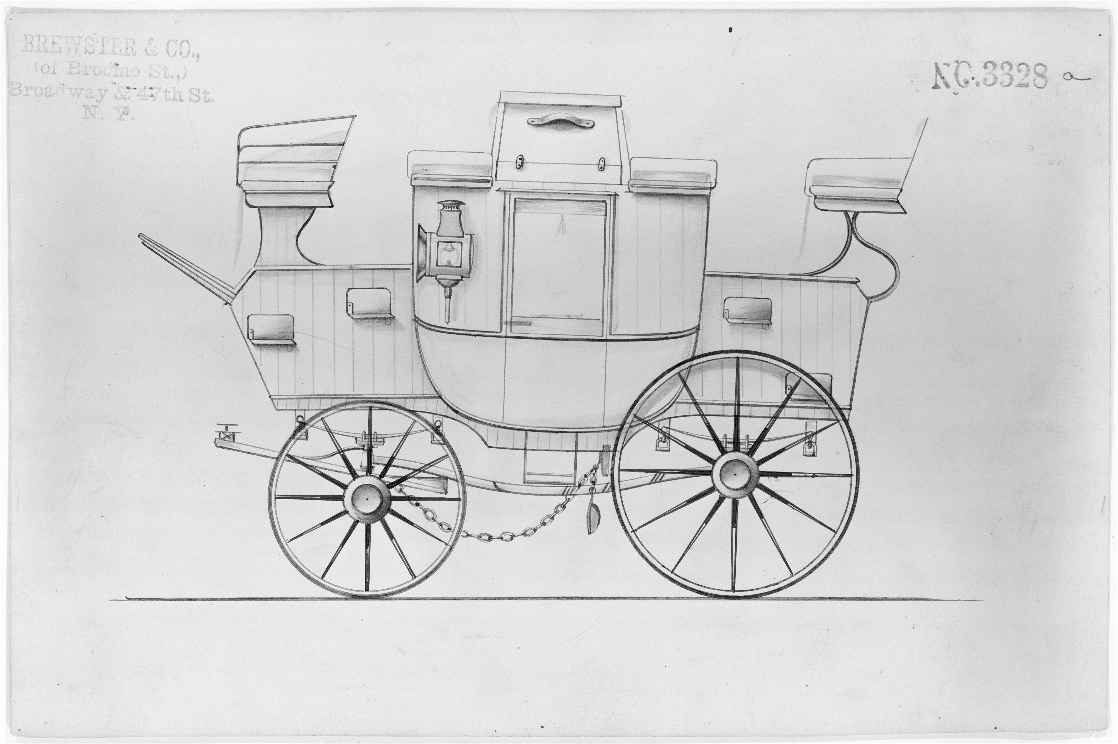 Drawing; Drawings